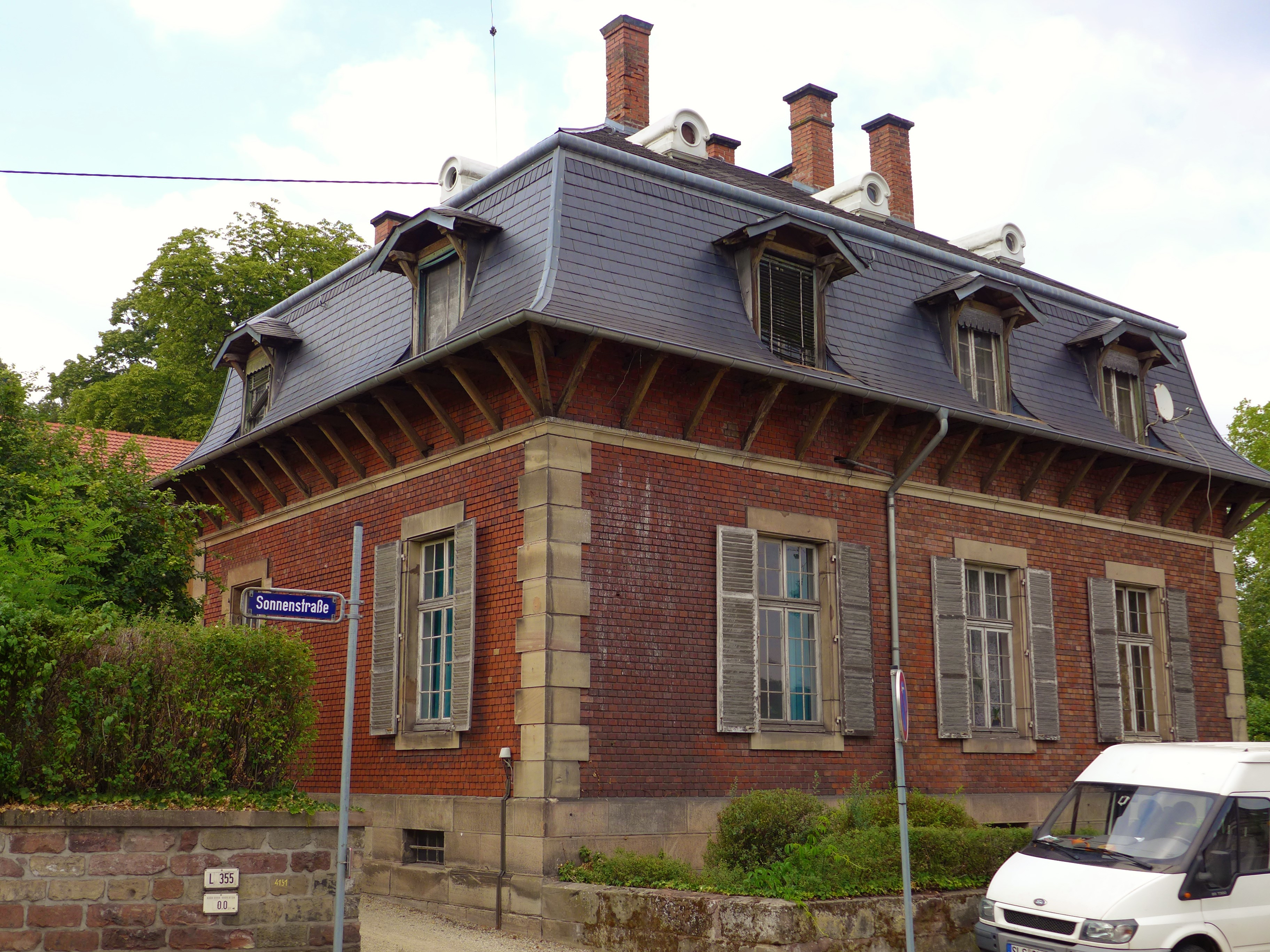 Wallerfangen, Neobarockes Haus am Ortseingang Wallerfangens von Dillingen kommend